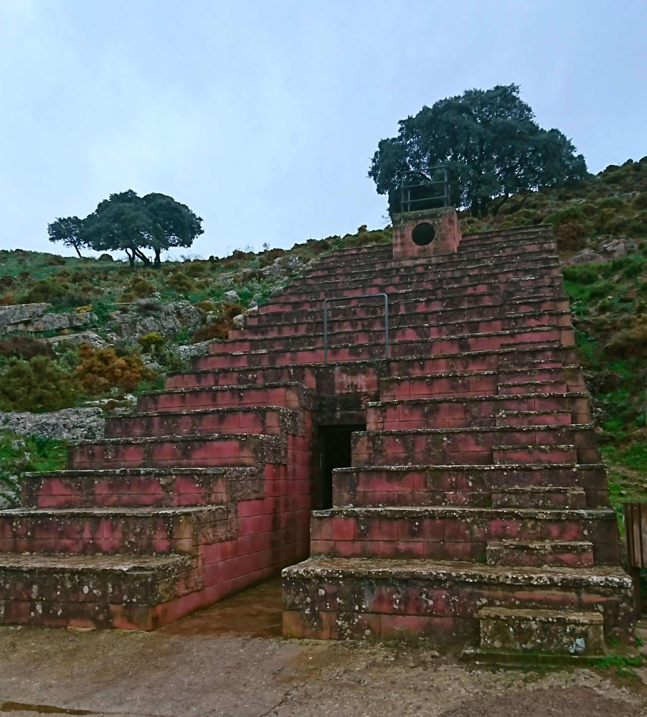 Cueva de Ardales 2